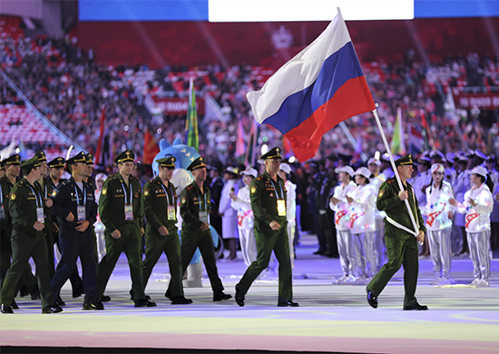 Сборная ВС РФ приняла участие в открытии Всемирных военных игр в Ухане